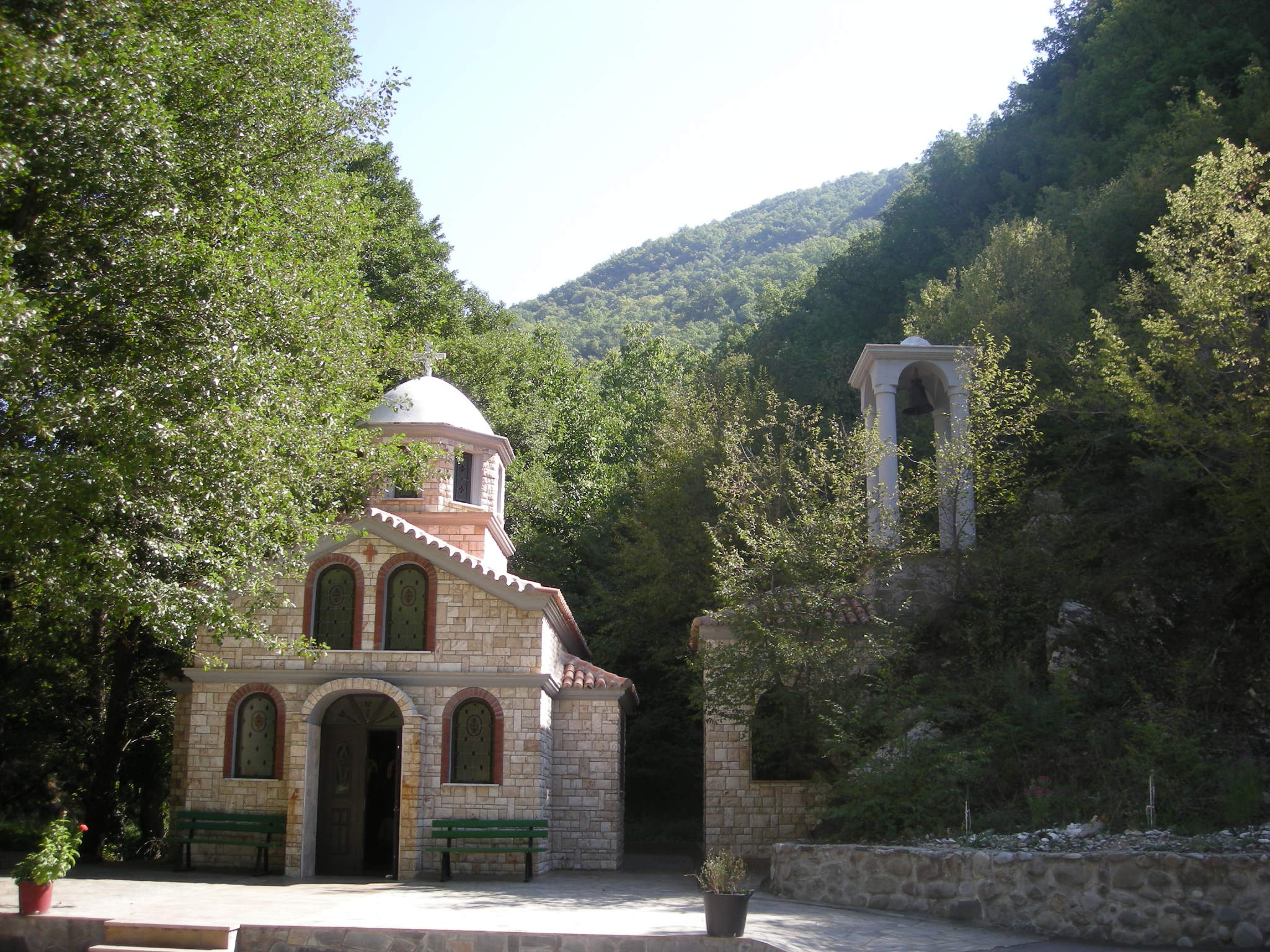 Ξώκλησι του Άγιου Ραφαήλ, στους Ποταμούς Δράμας